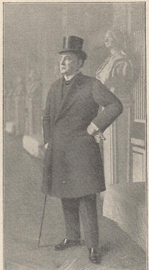 Illustration de la comédie d’Octave Mirbeau (1848-1917), « Le Foyer ». « L’Illustration théâtrale » n° 103, décembre 1908.